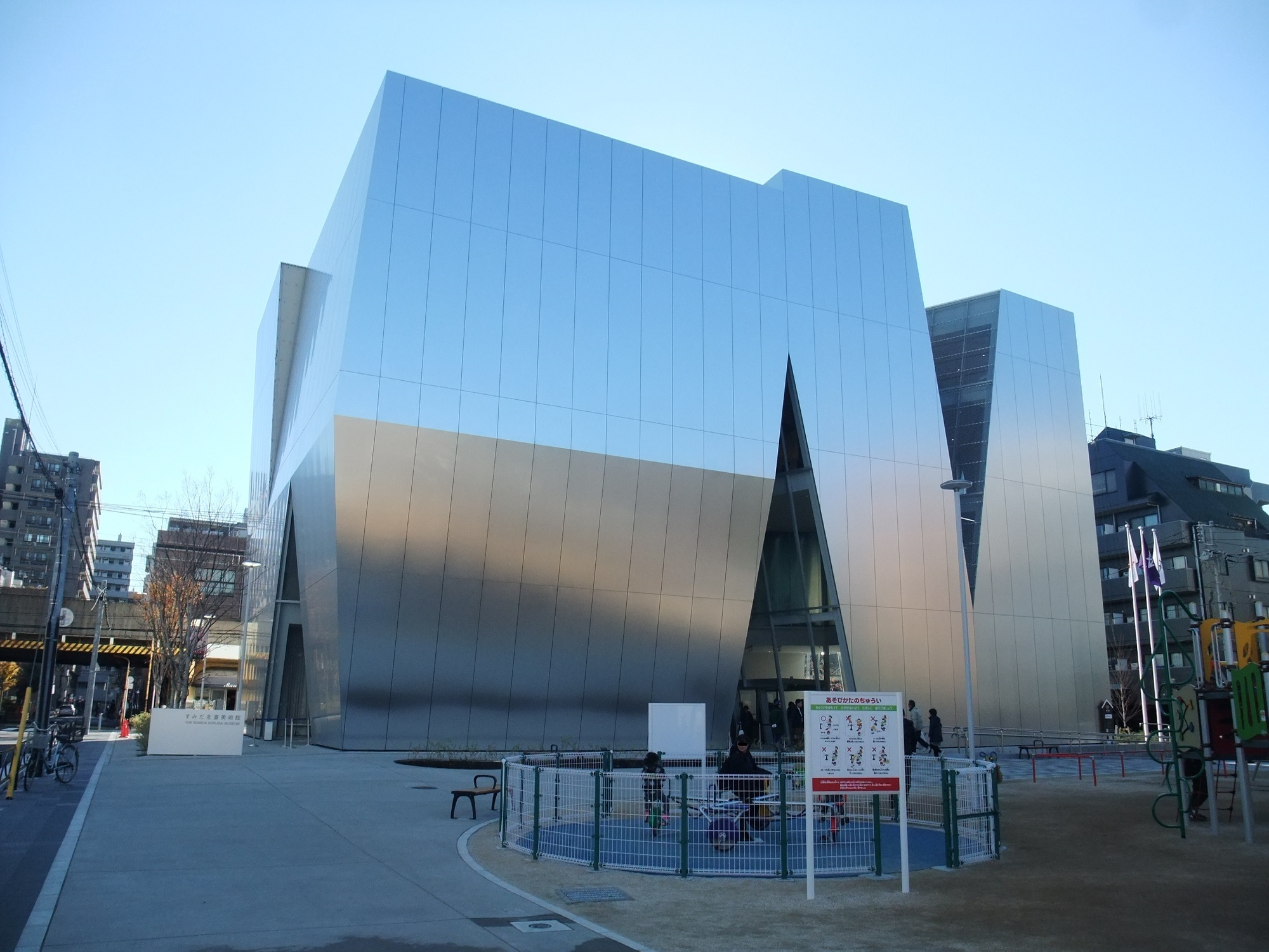 すみだ北斎美術館